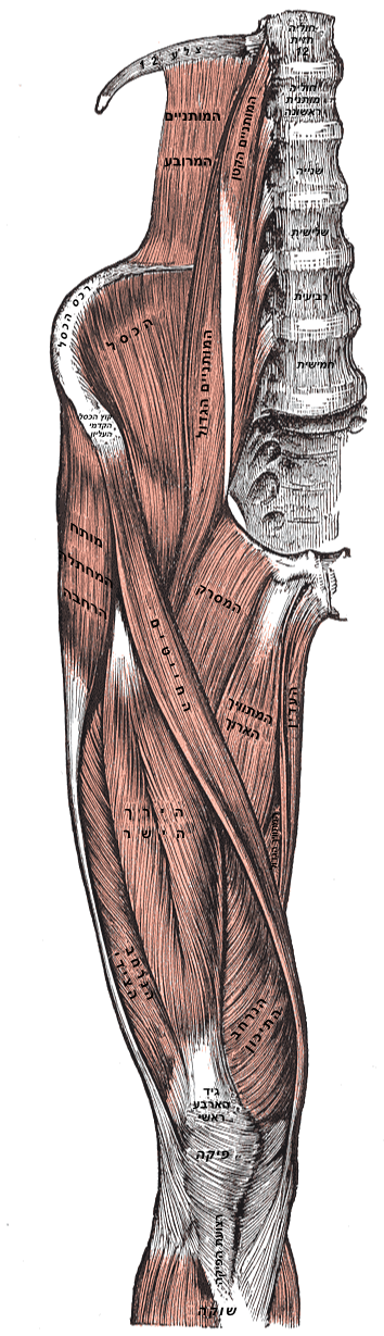 שרירי ירך ימין במבט קדמי